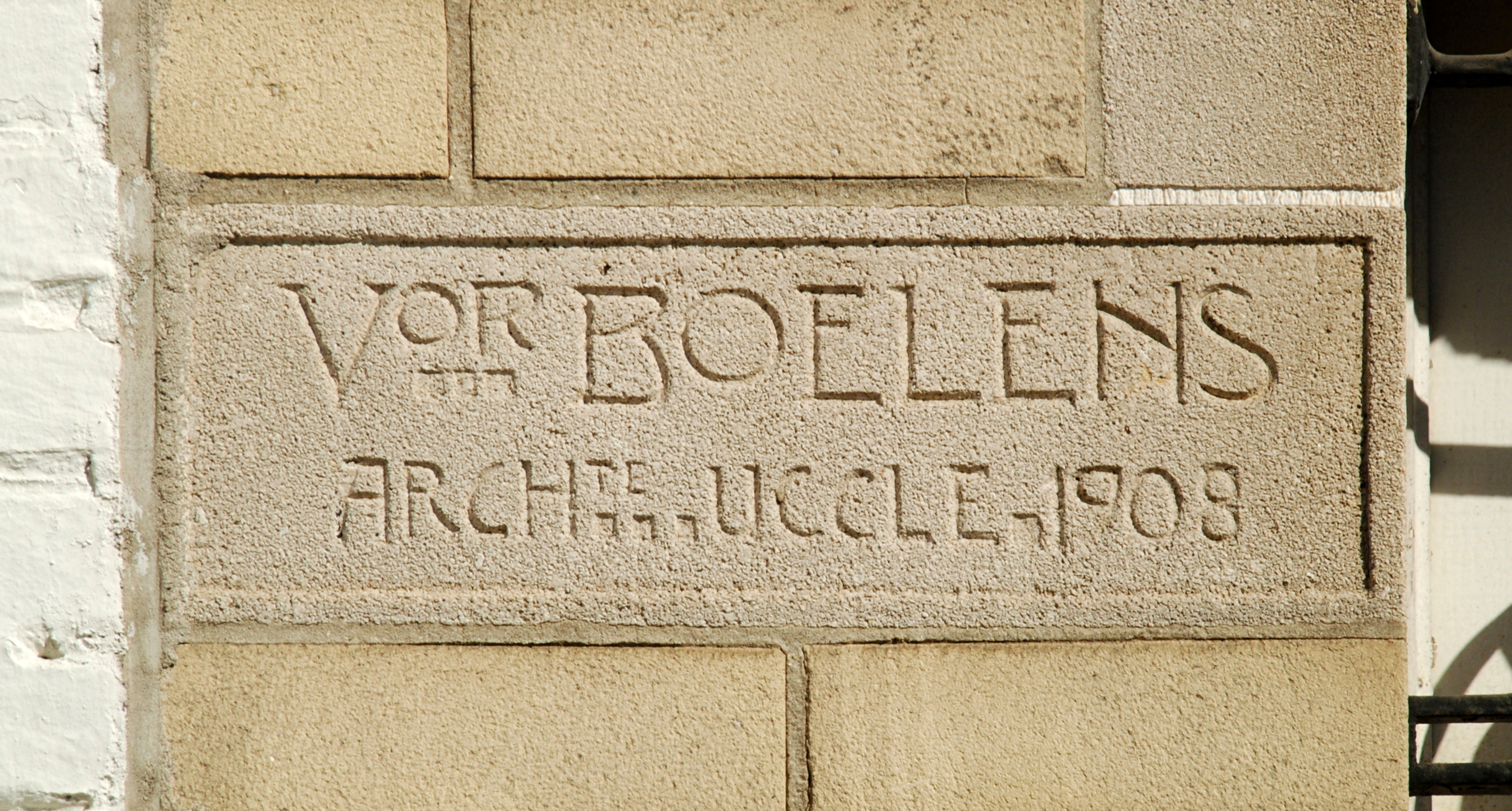 Belgique - Bruxelles - Avenue Brugmann 400 (Art nouveau, architecte Victor Boelens, 1908)